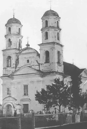 Беларуская (тарашкевіца): Ушачы (Ušačy), пляц Рынак (plac Rynak). Касьцёл Сьвятога Гераніма па маскоўскай перабудове